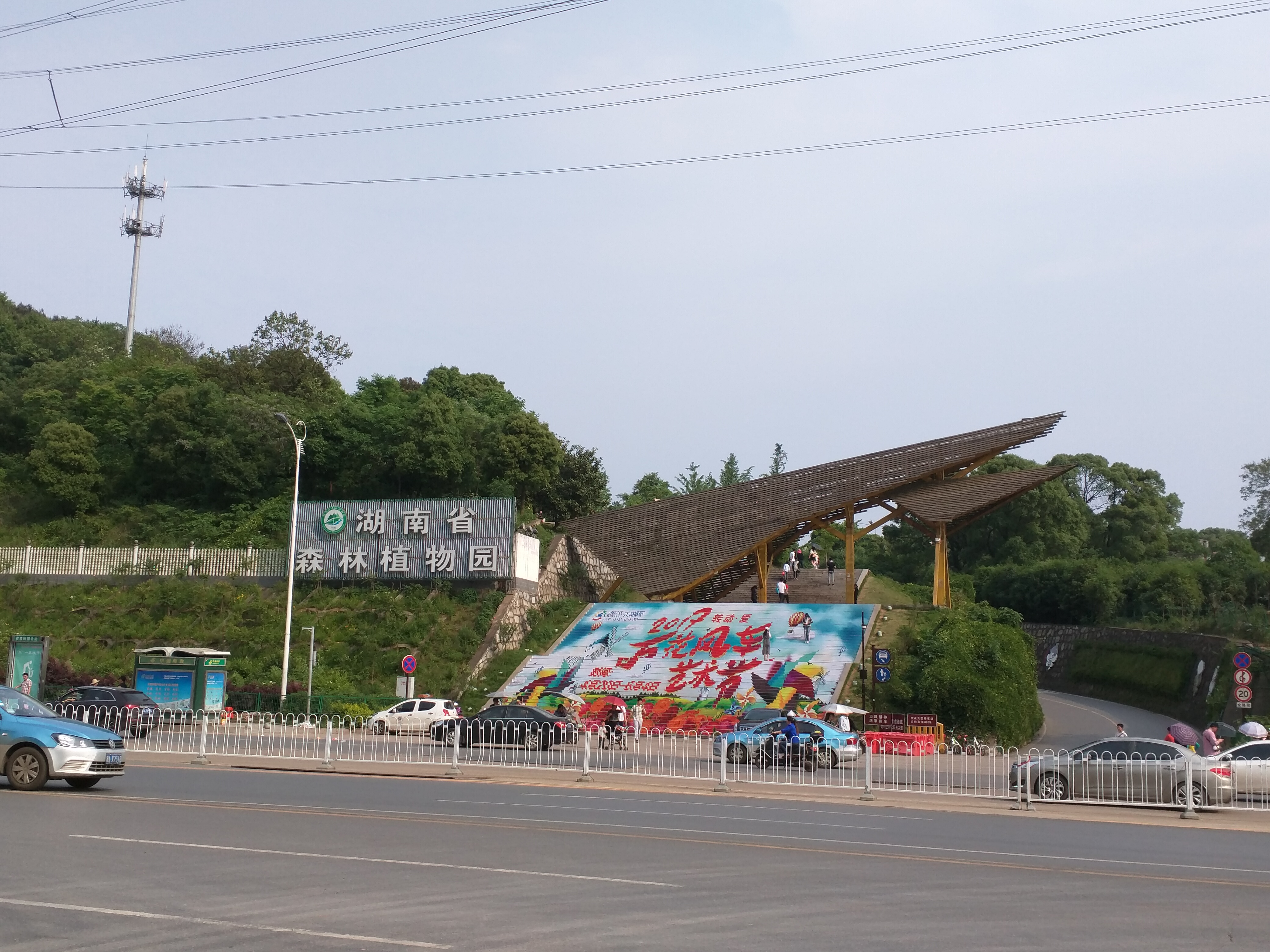 中文（中国大陆）: 湖南省森林植物园新北门